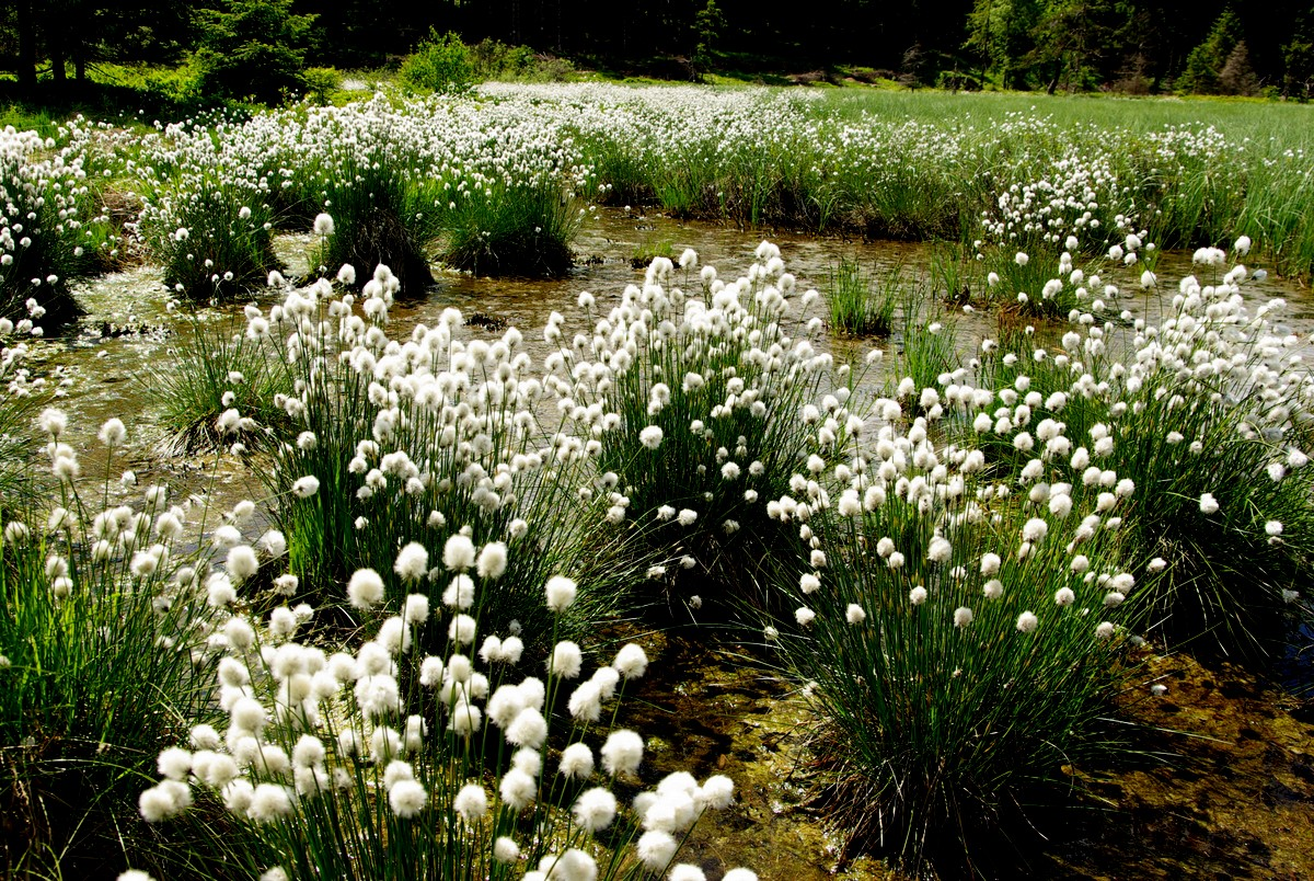 La Linaigrette engainée (Eriophorum vaginatum) est une Cyperaceae. des tourbières hautes acidiphiles et des tourbes minéralisées. Elle a massivement fructifié quand les drains créés au début du XXe siècle sur la tourbière de Jemnaufaing pour extraire la tourbe ont été obturés pour restaurer son fonctionnement hydraulique. Gestion biologique : Conservatoire d'espaces naturels de Lorraine. Cliché Vosagus 2/06/2009